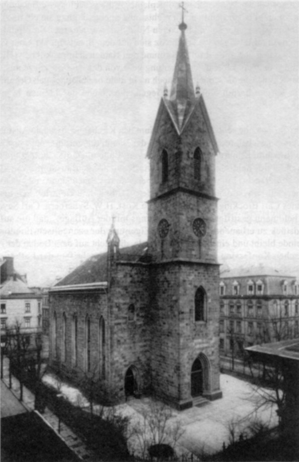 Diakoniekirche Wuppertal (Foto ~1900)